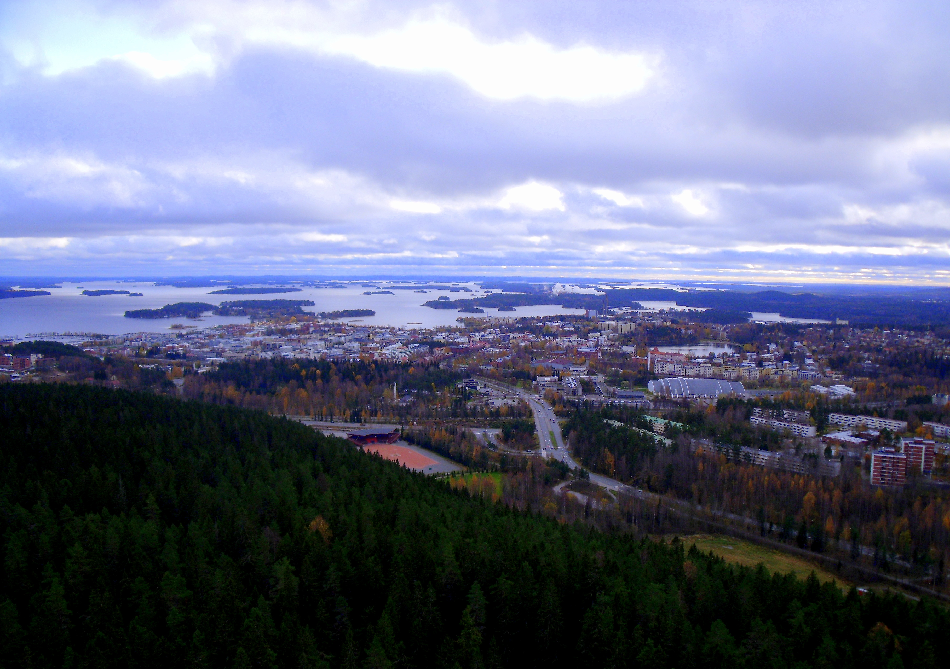 Imatge del nucli urbà de Kuopio des de la torre de Puijo, el novembre del 2011